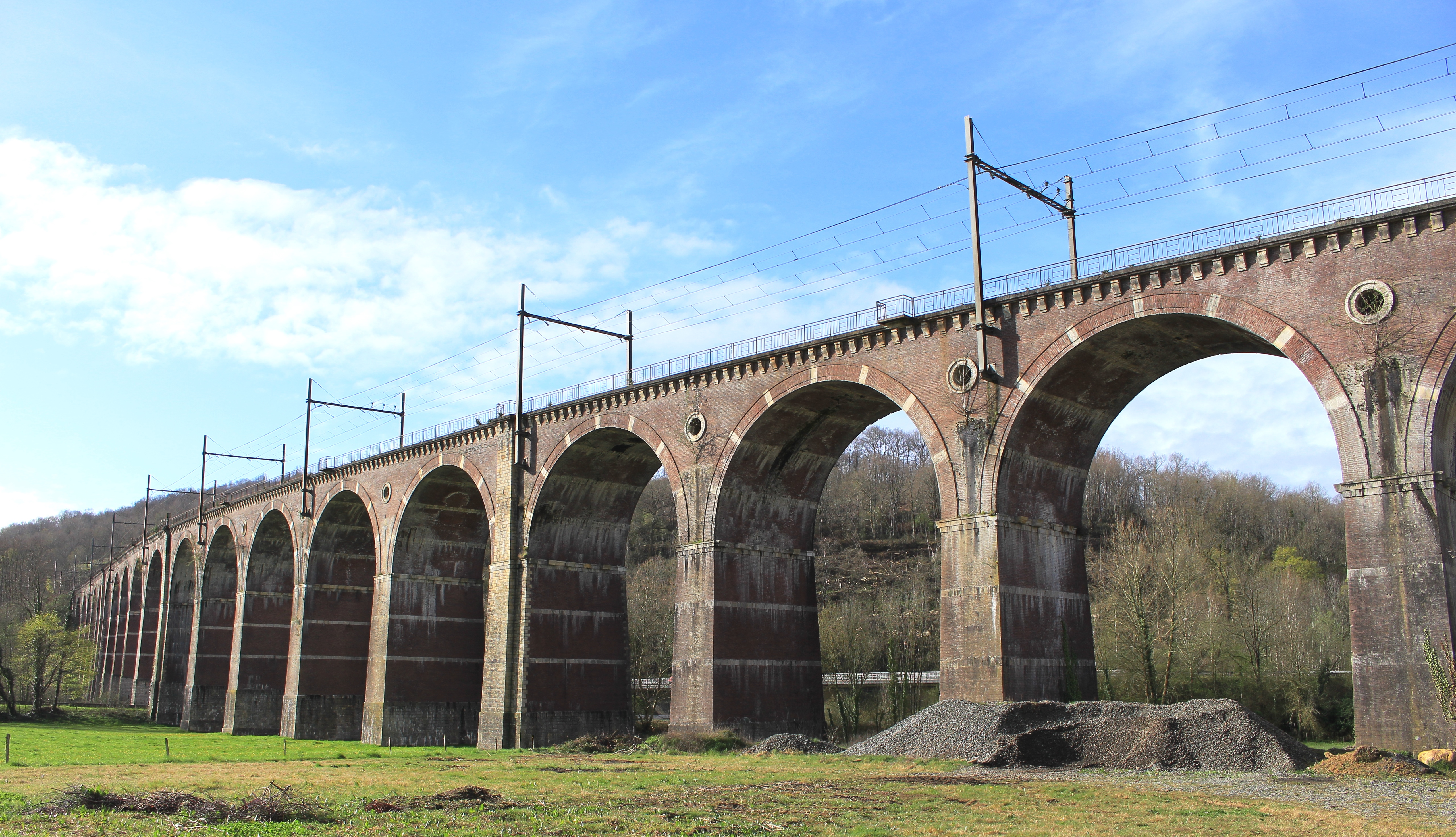 Viaduc à Lanespède (Hautes-Pyrénées)